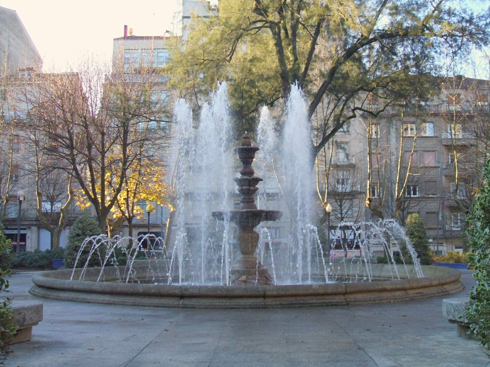 Orense - Parque de San Lázaro